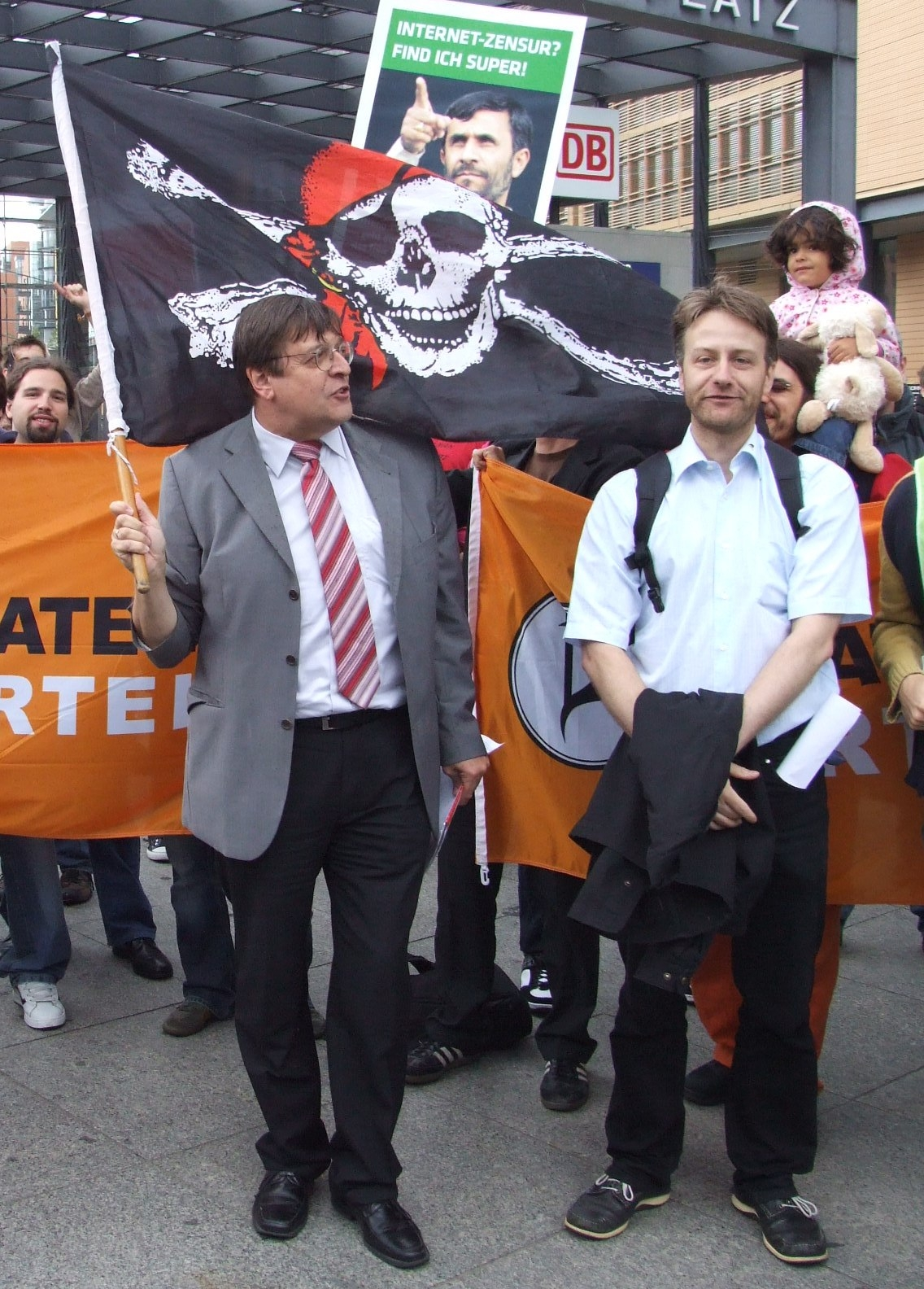 Jörg Tauss (vorne links) tritt nach der Demonstration gegen Internetsperren von der SPD zur Piratenparei über. Rechts daneben der spätere Vorsitzende (damals: stellvertretende Vorsitzende) der Piratenpartei Jens Seipenbusch.